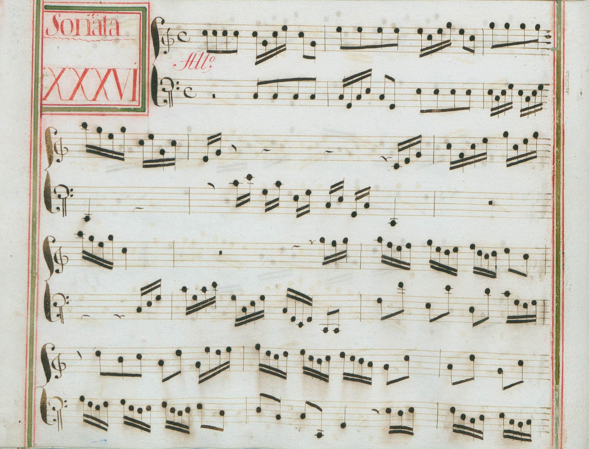 La sonate K. 72, telle qu'elle se présente dans le manuscrit de Venise, volume XIV no. 36.